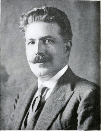 Atilio Narancio